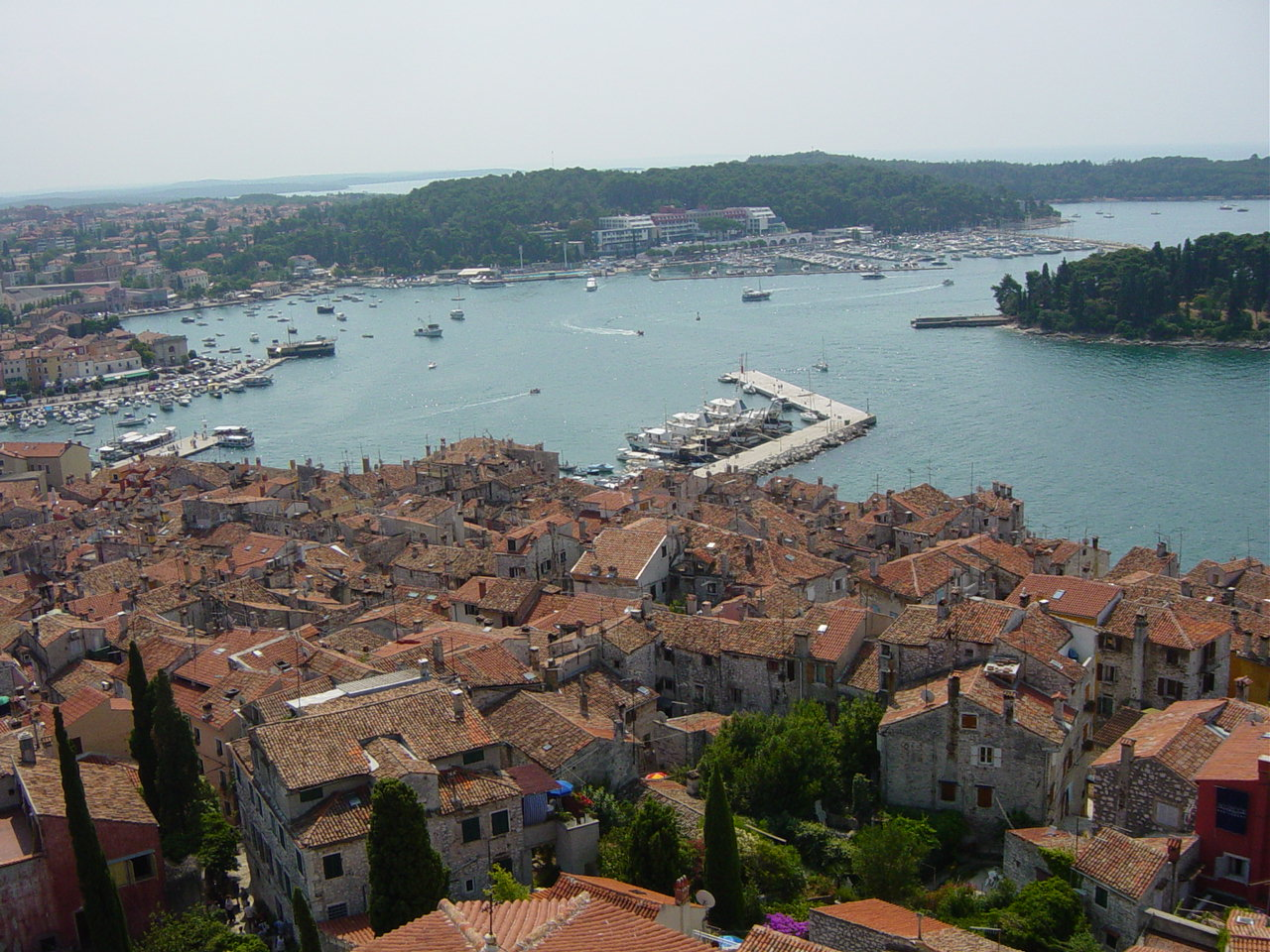 Rovinj, Istrië. Eigen werk.